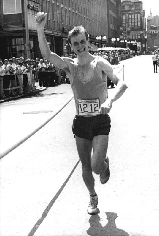 Uwe Koch ADN-ZB Gahlbeck 22.6.86 Leipzig: DDR-Meisterschaften Marathonlauf- Sieger der Altersklasse 1 und damit DDR-Meister im Marathon wurde der Potsdamer ASK-Sportler Uwe Koch. Die Strecke führte über 2 3/4 Runden durch die Innenstadt zum Ziel auf dem Markt.